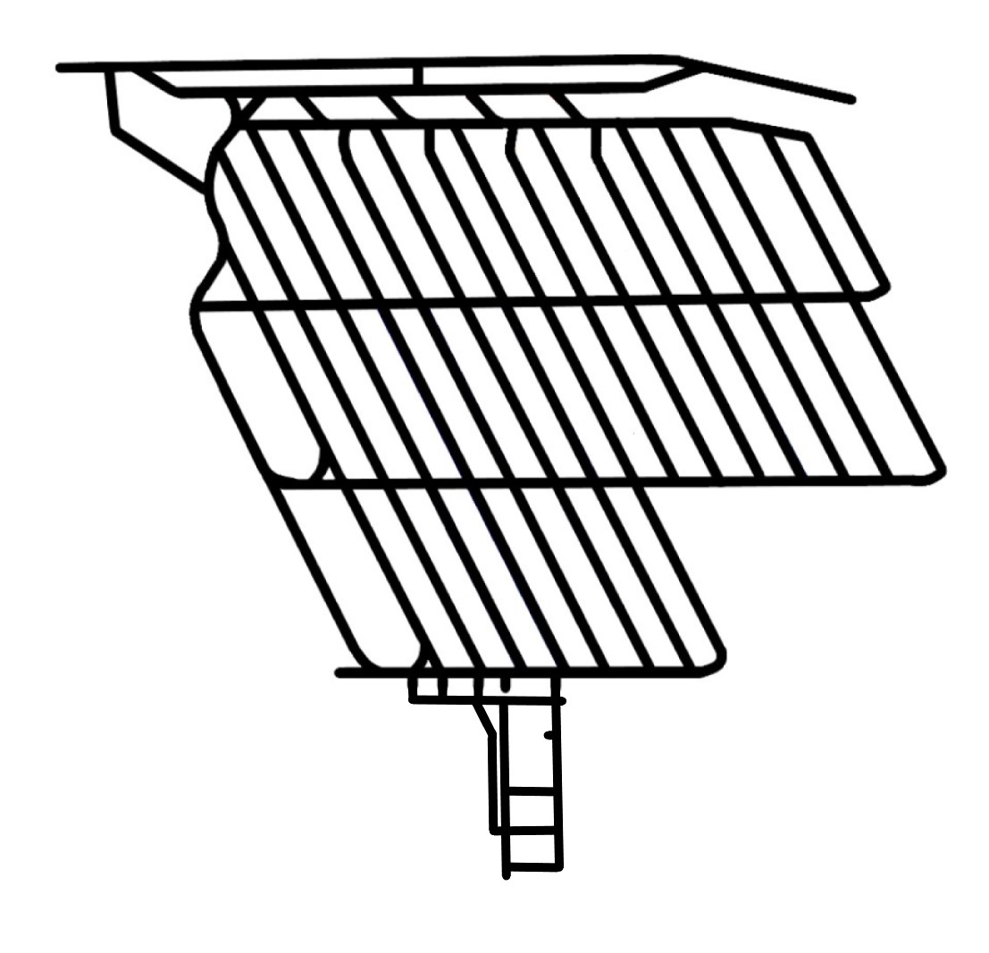 Stollensystem der ehemaligen Untertageanlage Lorch-Wispertal